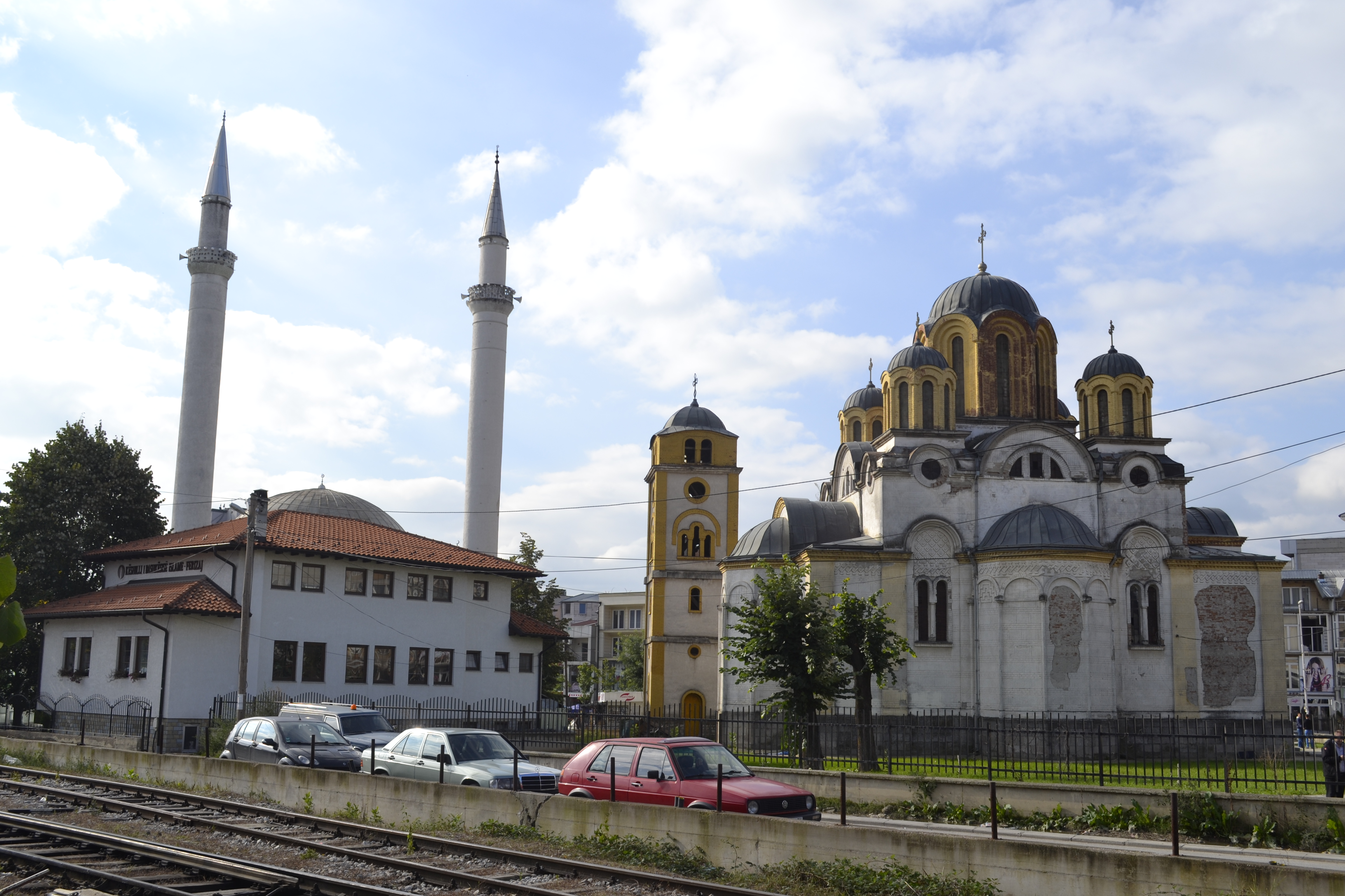 Kompleksi i objekteve : Xhami dhe Kishë Orthodokse